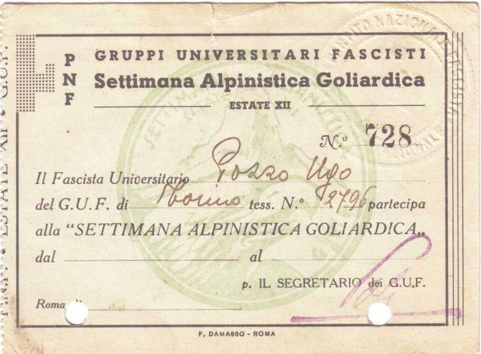 Carte de participation à une semaine alpine goliardique, organisée par le GUF, recto.